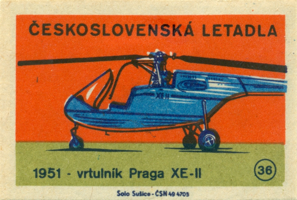 nálepky